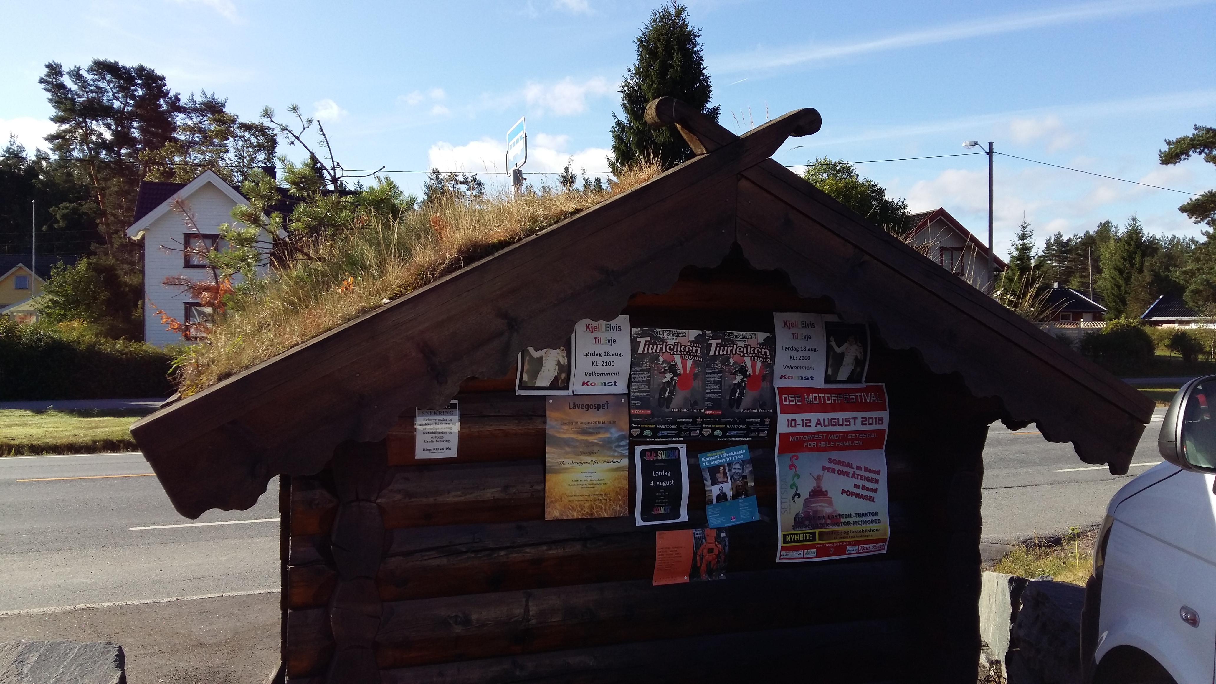 Arrêt de bus et panneau d'affichage très répandu en Norvège du Sud.